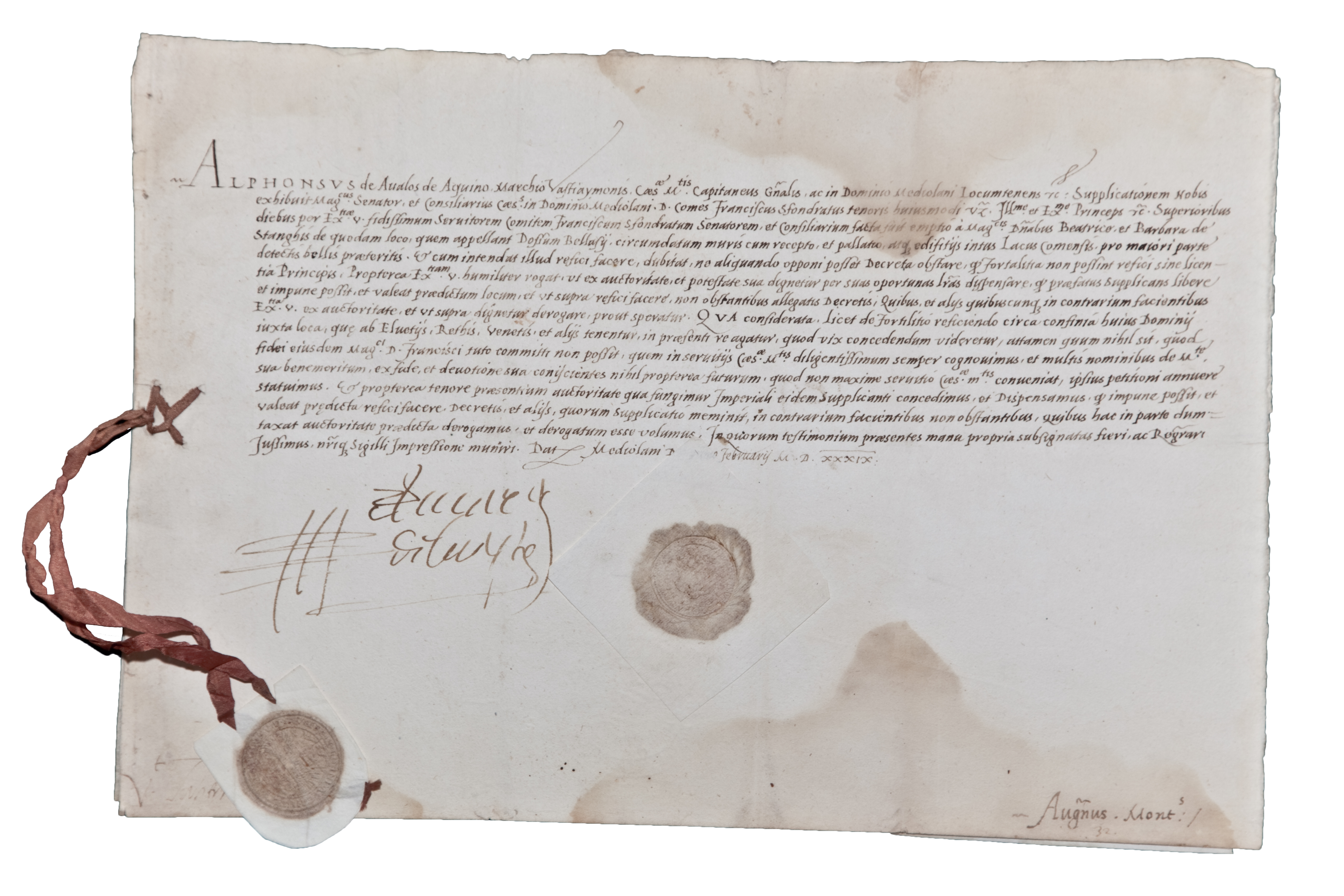 Archivio Pietro Pensa, Pergamene 3, 17